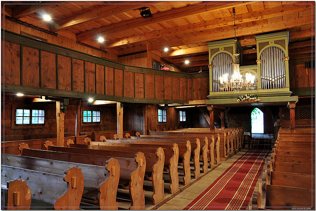 Interior de la iglesia